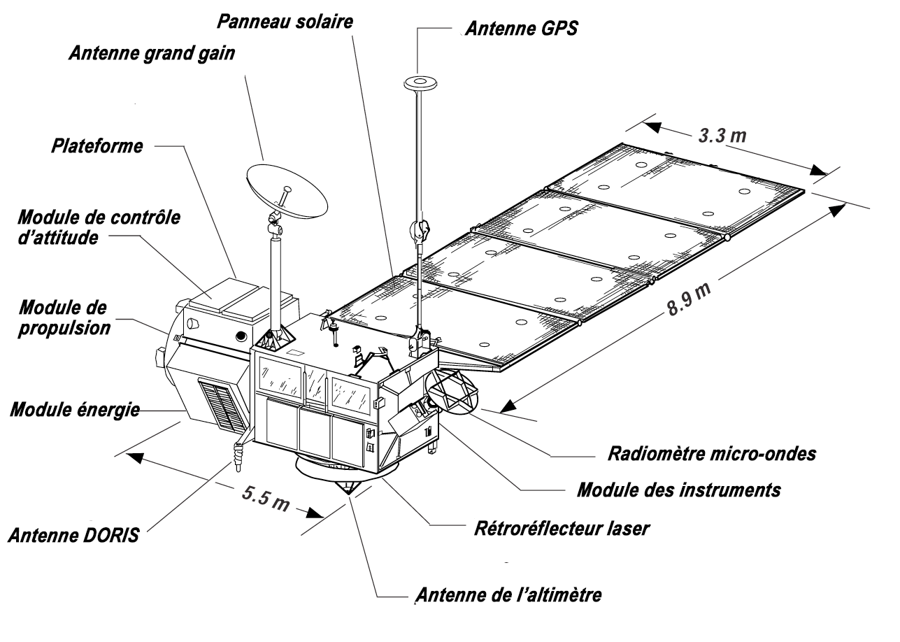 Schéma du satellite océanographique TOPEX-Poseidon (légende en français)